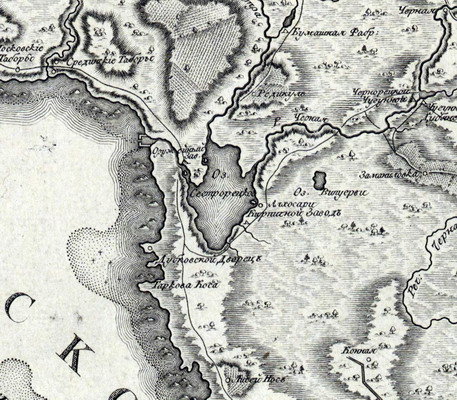 план Сестрорецкого Разлива в 1792 году